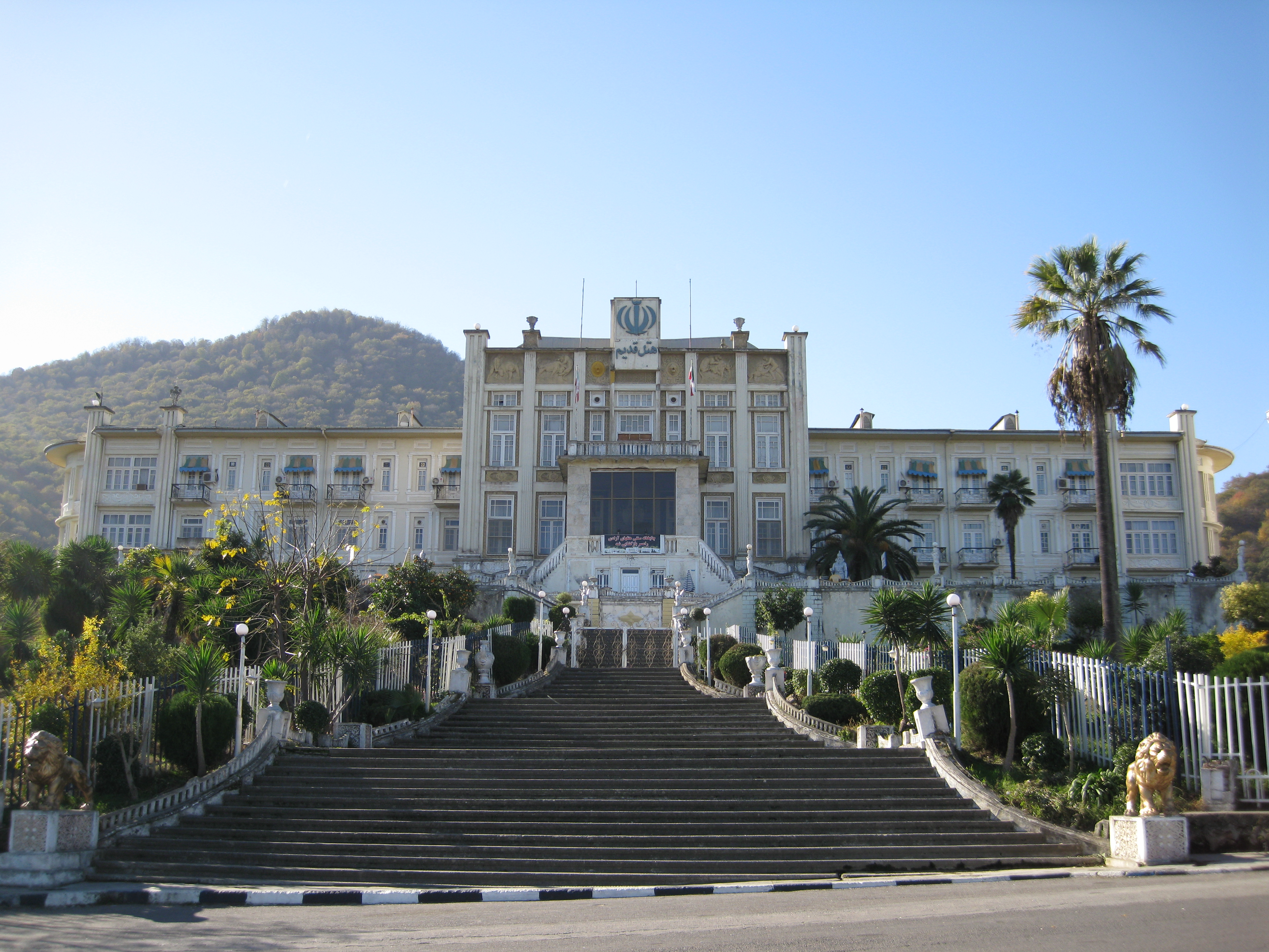 Old Hotel Of Ramsar, Mazandaran, Iran